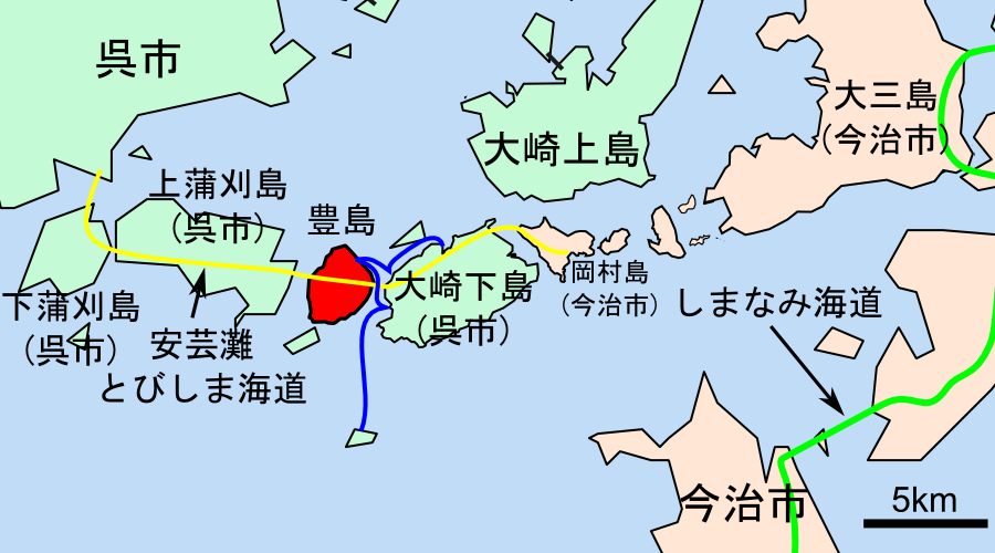 豊島の位置図